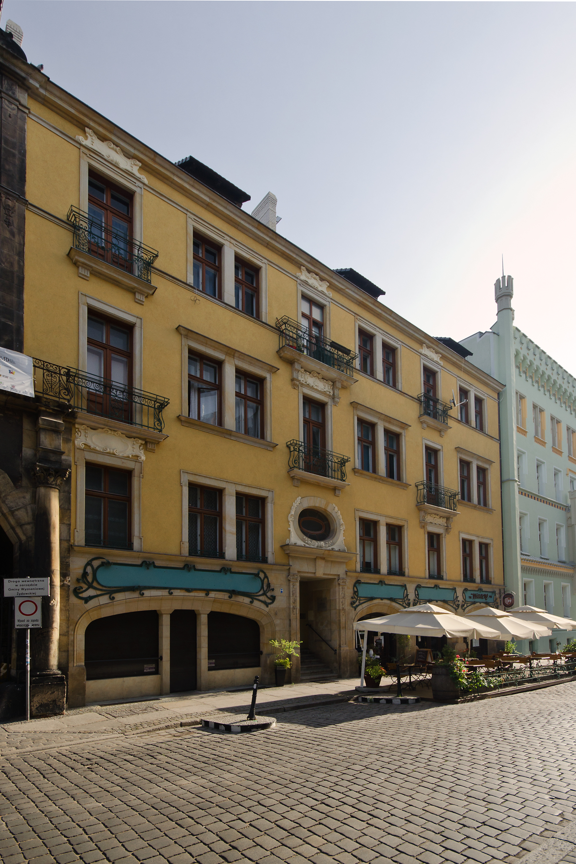 Budynek dawnego Zarządu Gminy Żydowskiej, obecnie budynek mieszkalno-handlowy Włodkowica 5, 7-9, Miasto Wrocław - Stare Miasto